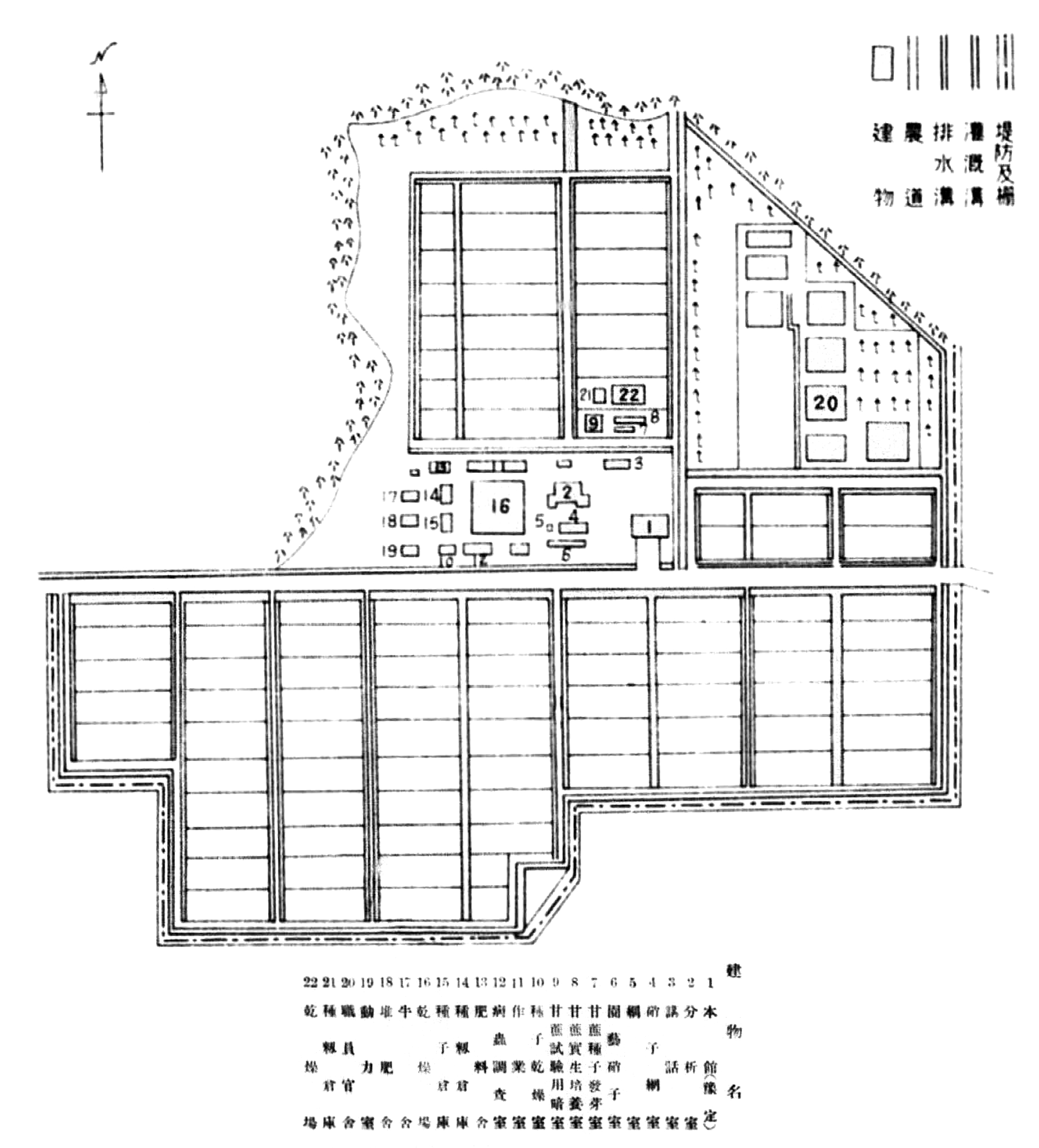 臺中州立農事試驗場位於台中市後壠子